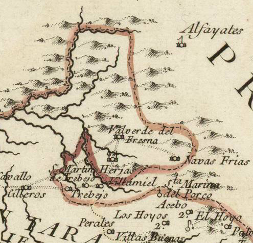 Comarca del Valle del Jálama en un mapa de la "provincia de Estremadura" publicado por Tomás López en 1766. Nótese que la orientación del mapa es inusual, con el oeste arriba.